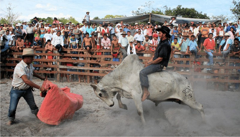 toreo criollo